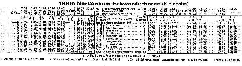 Fahrplan der Butjadinger Eisenbahn (KBS 198m, Sommerfahrplan 1934/35)